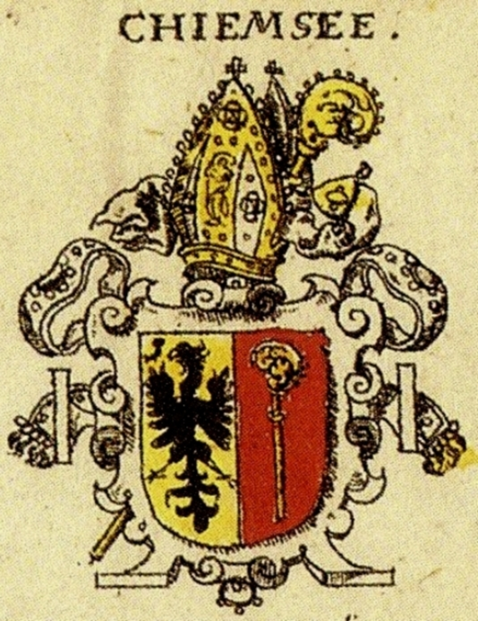 Wappen des Bistums Chiemsee nach Siebmachers Wappenbuch